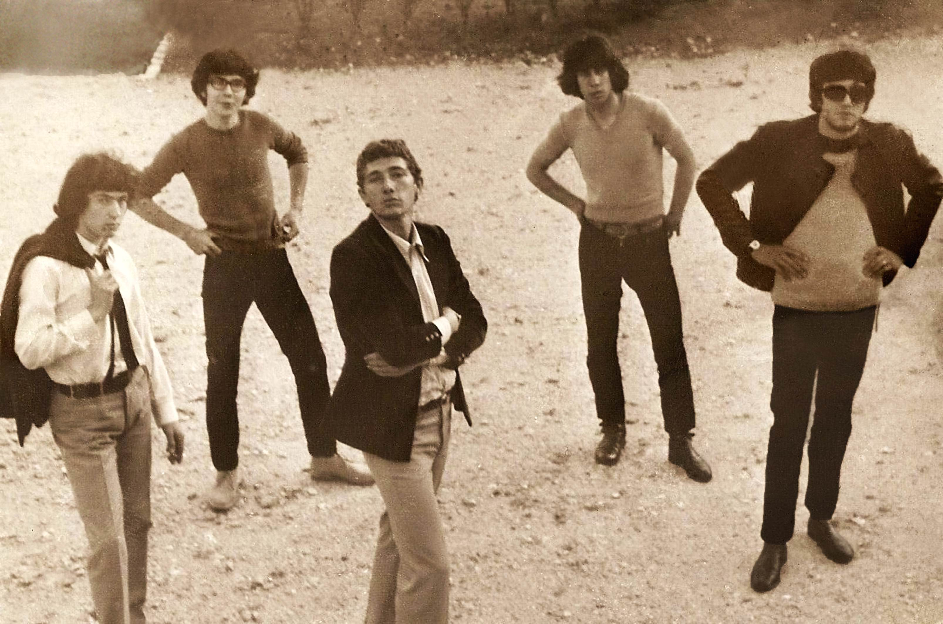 De gauche à droite : Michel Rosengarten (guitare), Christian Grégoire (guitare), Denis Goulesque (chant), Christian Vander (batterie), Richard DeMaria (basse)